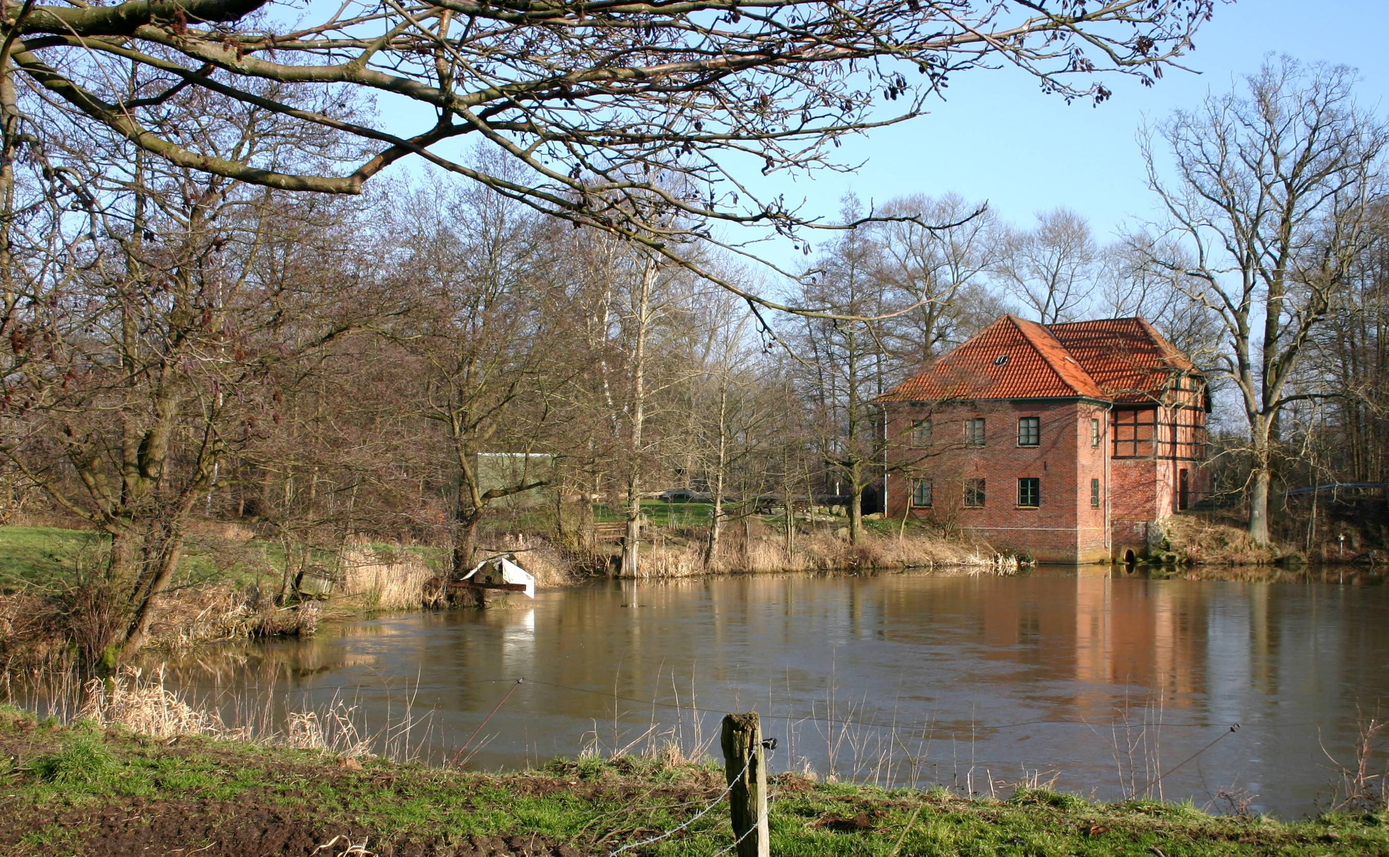 Wassermühle Beverstedt-Deelbrügge mit Teich